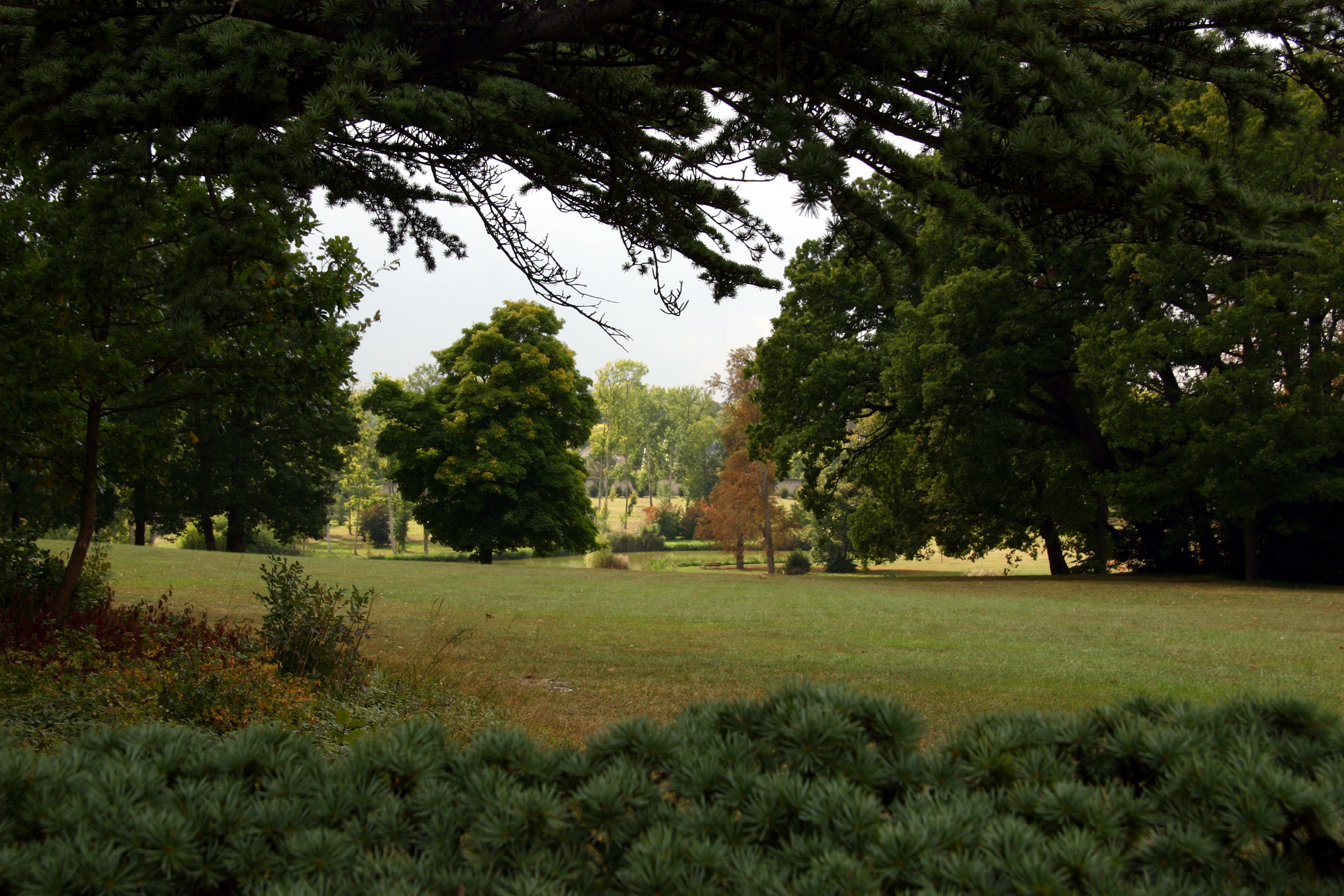 Château de Beauregard